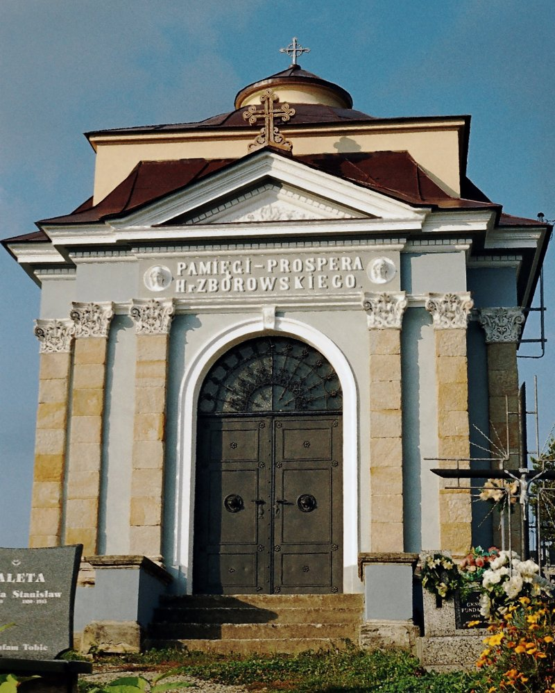 Kaplica na cmentarzu w Bieździedzy.